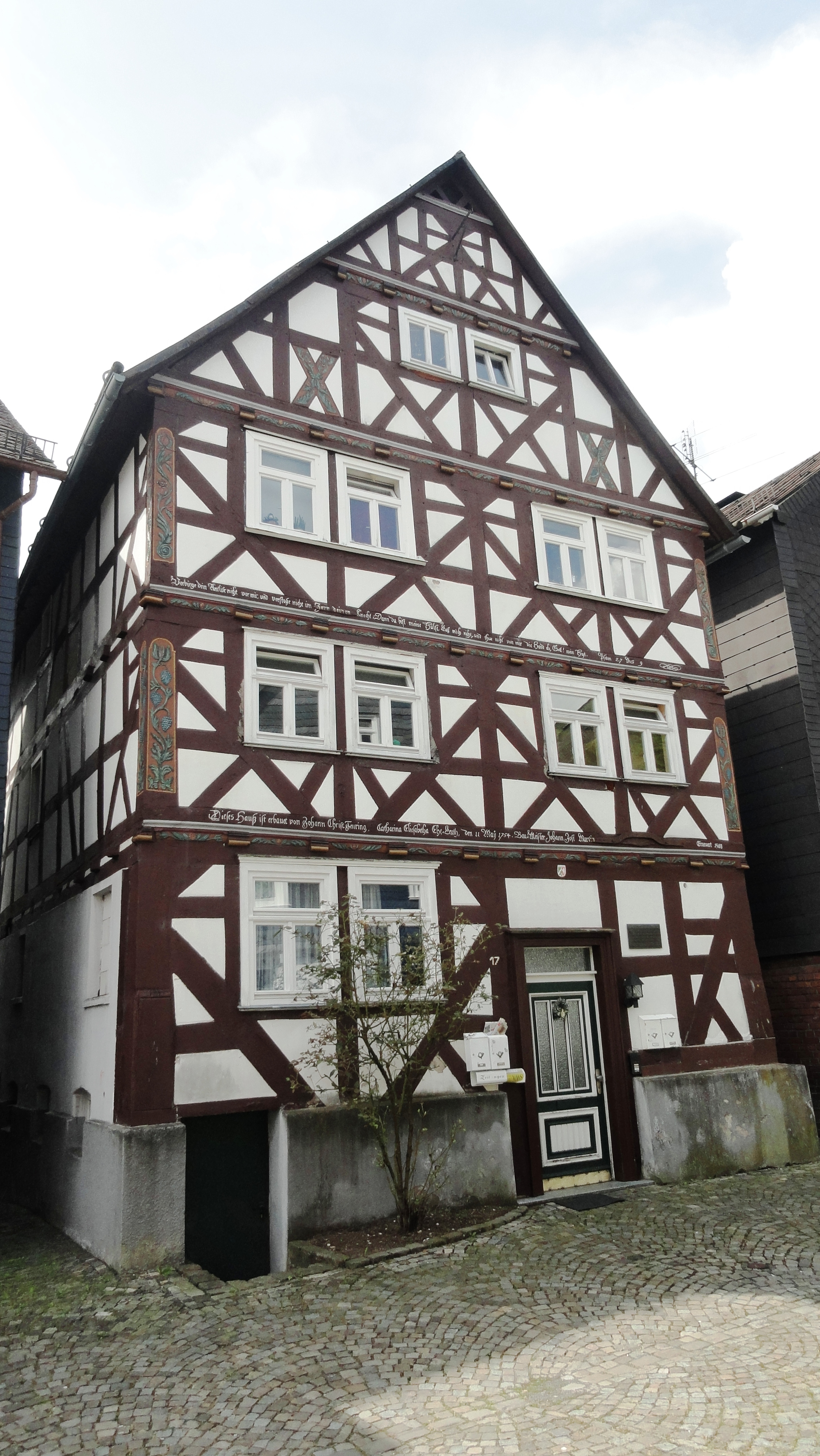 Fachwerkhaus in der Altstadt von Bad Laasphe, Steinweg 17 This is a photograph of an architectural monument.